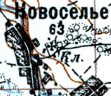 Топографическая карта Ленинградской области, квадрат VIc-28 (Луга), деревня Новоселье Володарского СП